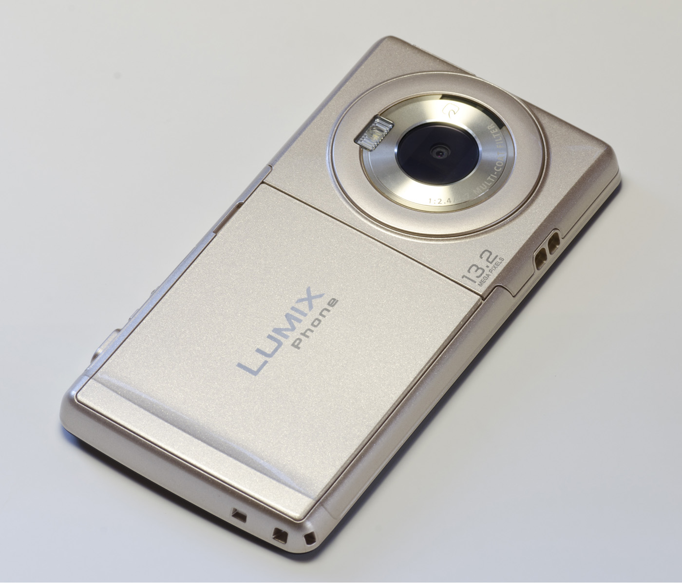 docomo with series LUMIX Phone P-02D